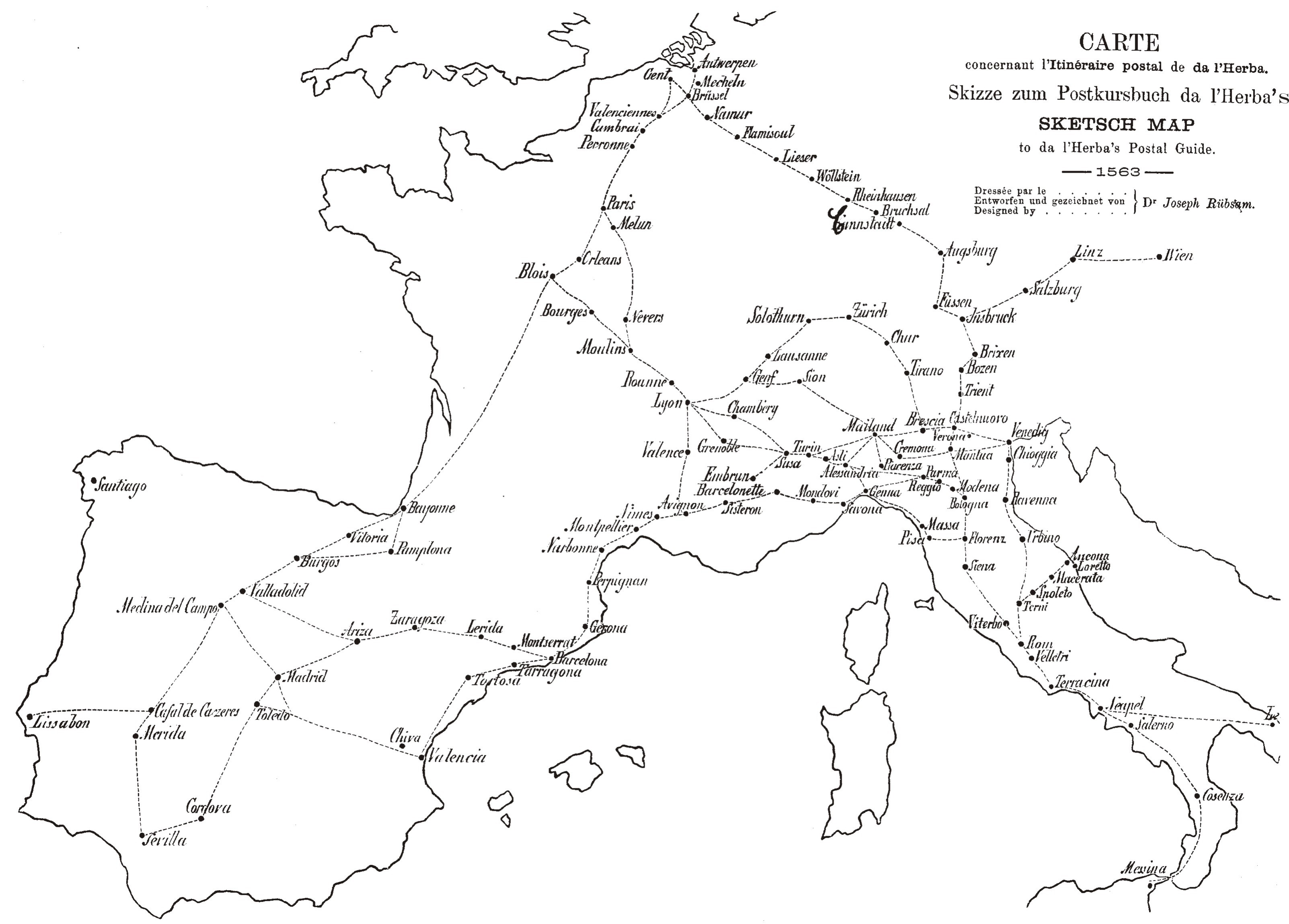 Europäische Postkurse 1563 nach dem Reisebuch des Giovanni da L’Herba, Skizze, mit handschriftlicher Korrektur bei Cannstadt, möglicherweise von einem Archivar des Thurn-und-Taxis-Archivs Regensburg